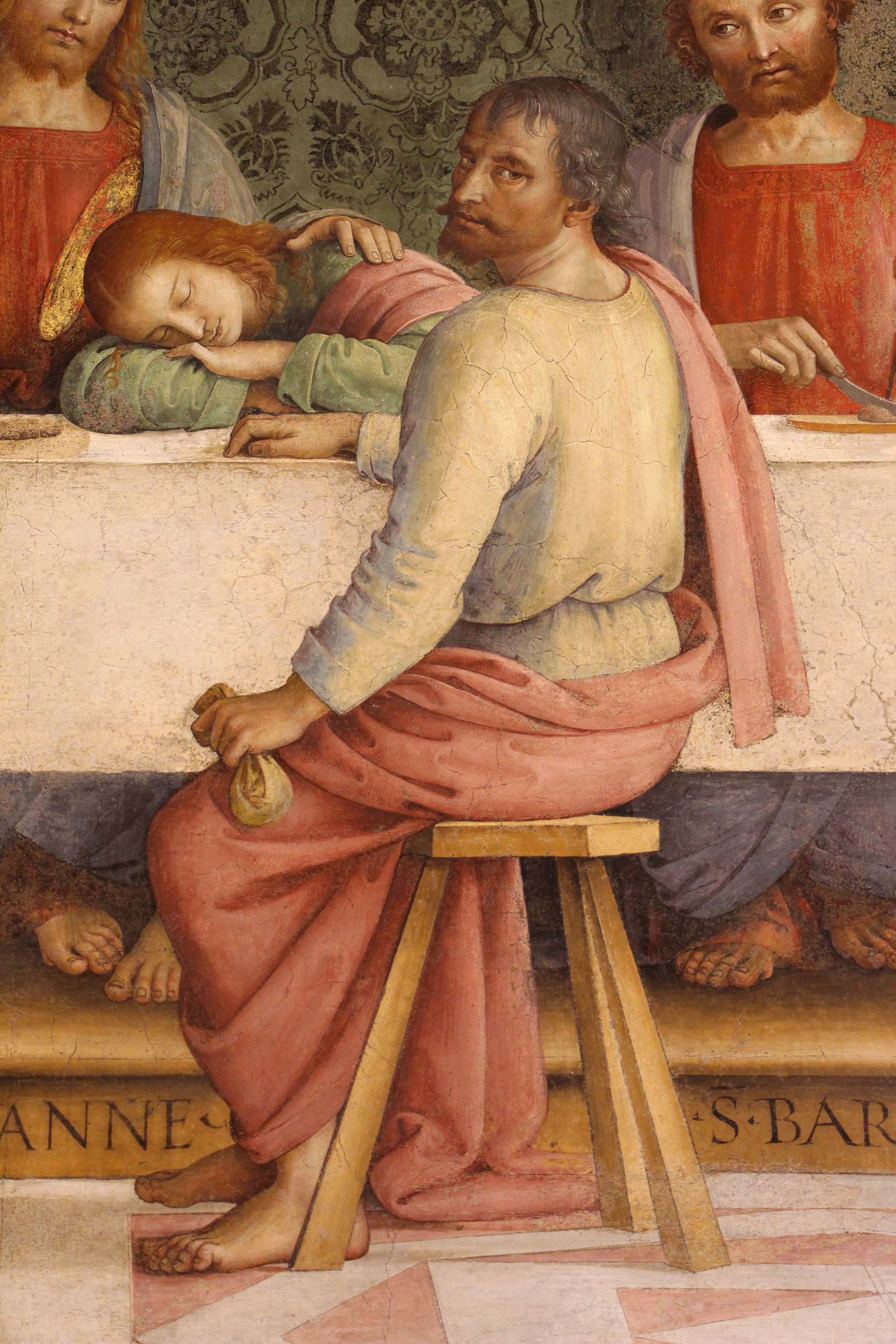 Cenacolo di Fuligno - MIBAC The making of this document was supported by Wikimedia CH. (Submit your project!) For all the files concerned, please see the category Supported by Wikimedia CH. This is a photo of a monument which is part of cultural heritage of Italy.